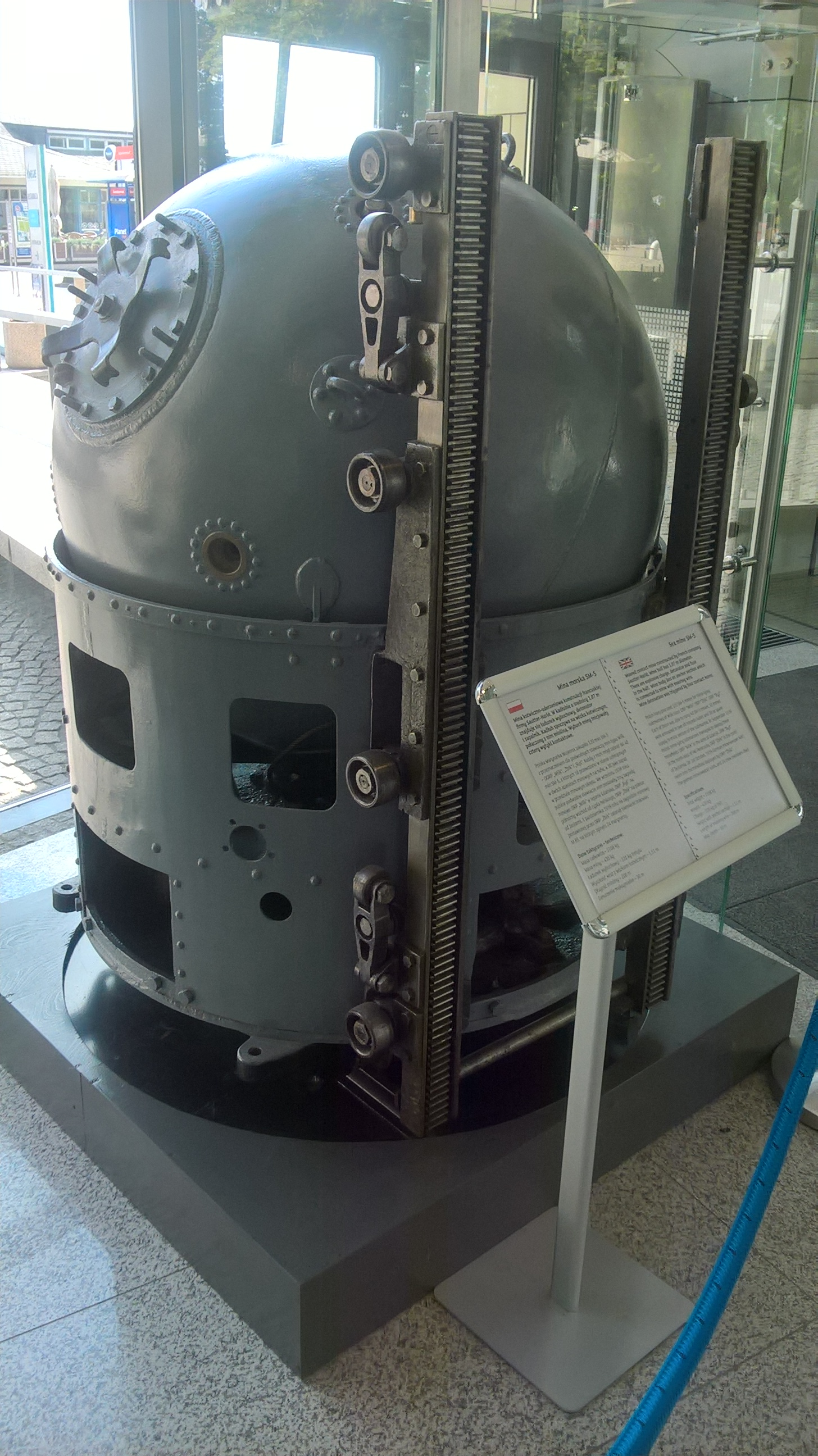 Francuska mina kotwiczno-kontaktowa SM-5 eksponowana w Muzeum Marynarki Wojennej w Gdyni.